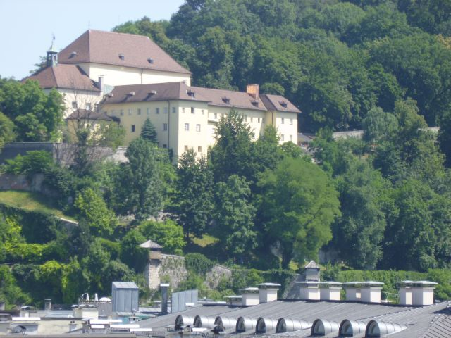 Kapuzinerkloster und -kirche, hl. Bonaventura, Trompeterschlössl und Mauern